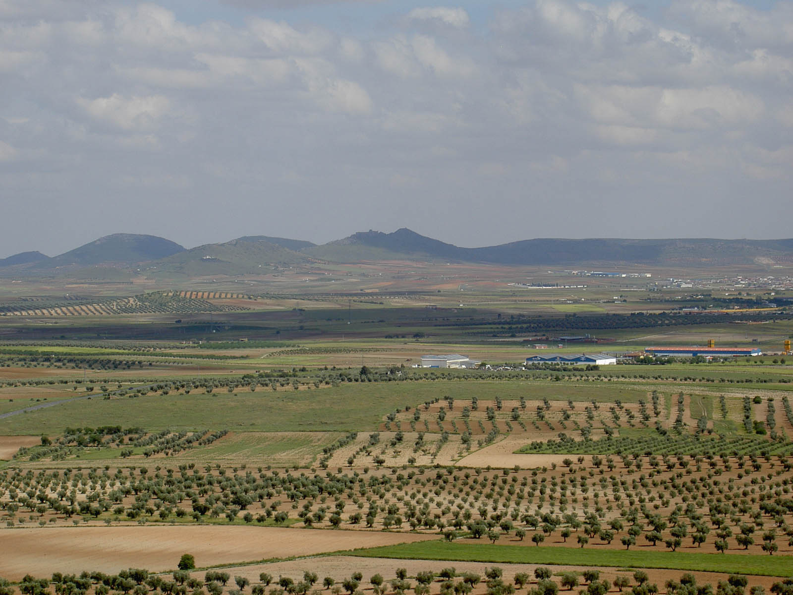 Almonacid de Toledo, España.